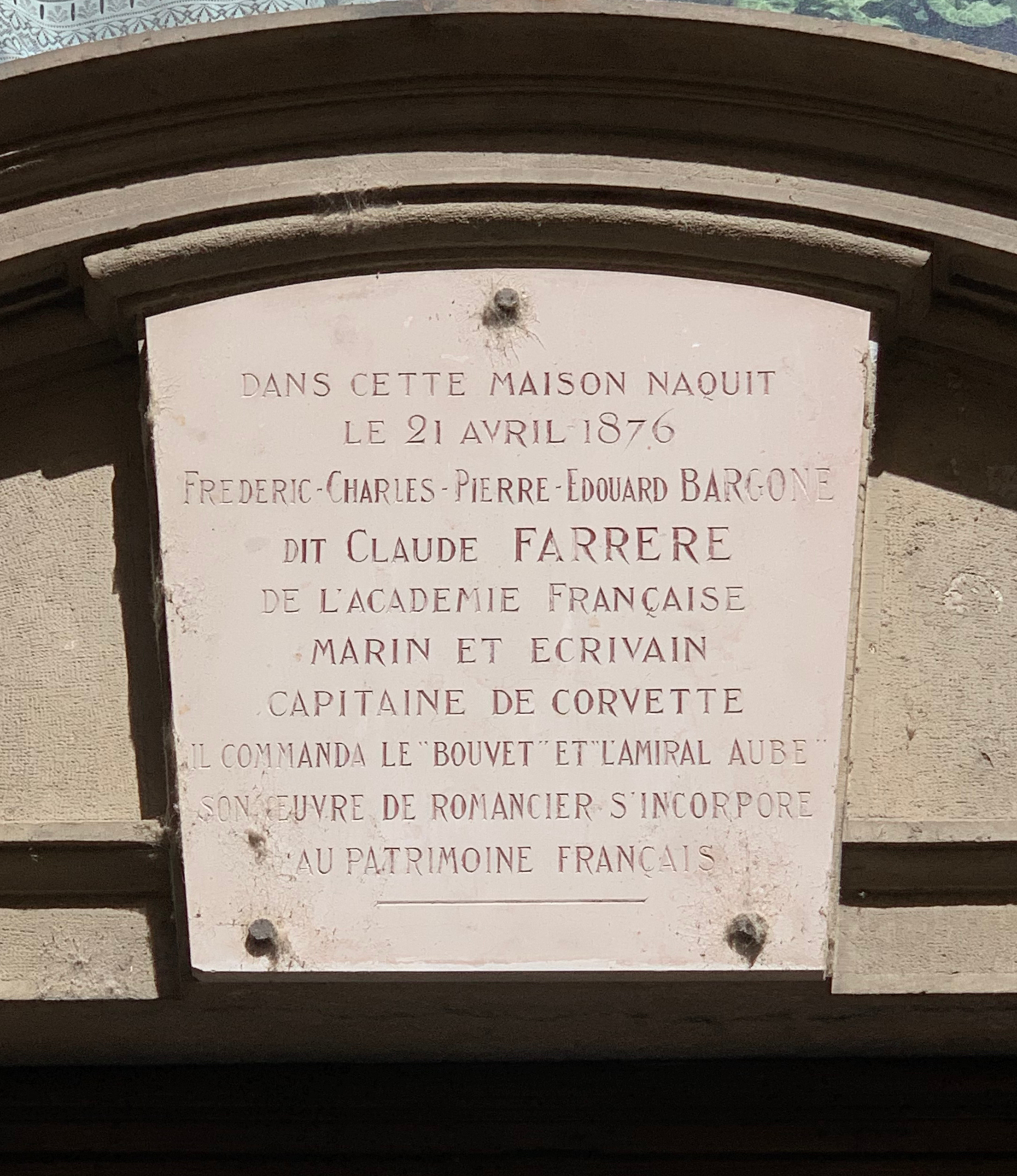 Plaque Ici est né Claude Farrère à Lyon (juin 2019) au 31 rue Godefroy. recto in engraving: DANS CETTE MAISON NAQUIT LE 21 AVRIL 1876 FREDERIC-CHARLES-PIERRE-EDOUARD BARGONE DIT CLAUDE FARRERE DE L’ACADEMIE FRANÇAISE MARIN ET ECRIVAIN CAPITAINE DE CORVETTE IL COMMANDA LE BOUVET ET L’AMIRAL AUBE SON OEUVRE DE ROMANCIER S’INCORPORE AU PATRIMOINE FRANÇAIS